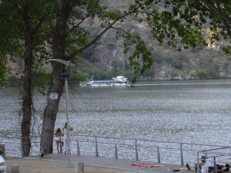 Dam area in Miranda do Douro (Portugal)